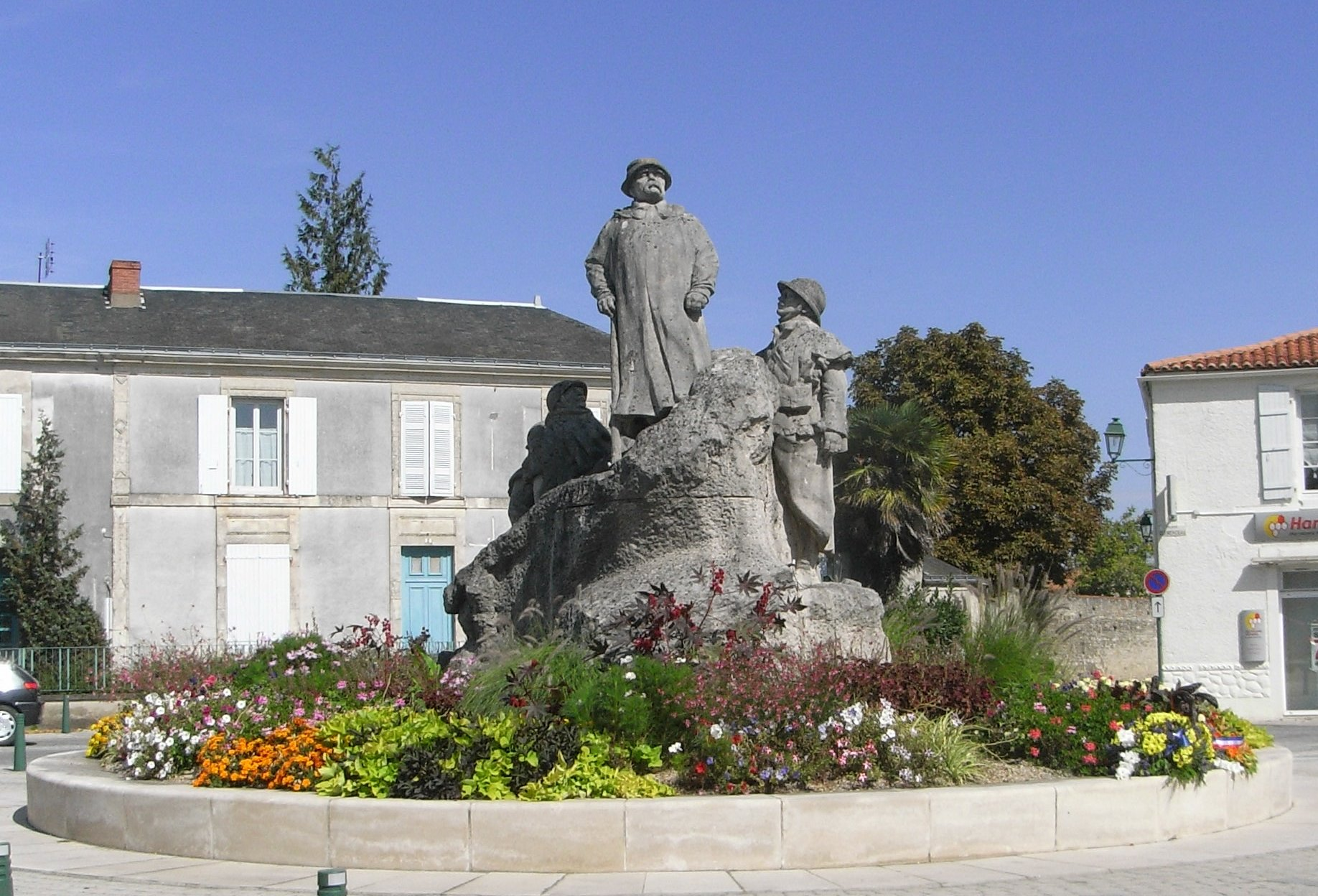 Statue de Georges Clemenceau à Sainte-Hermine en Vendée (France), sculptée par François-Léon Sicard. La statue a été décapitée par les troupes d'occupation. La tête originale, conservée à la «maison de Georges Clemenceau» de Saint-Vincent-sur-Jard, a été restaurée par la suite.